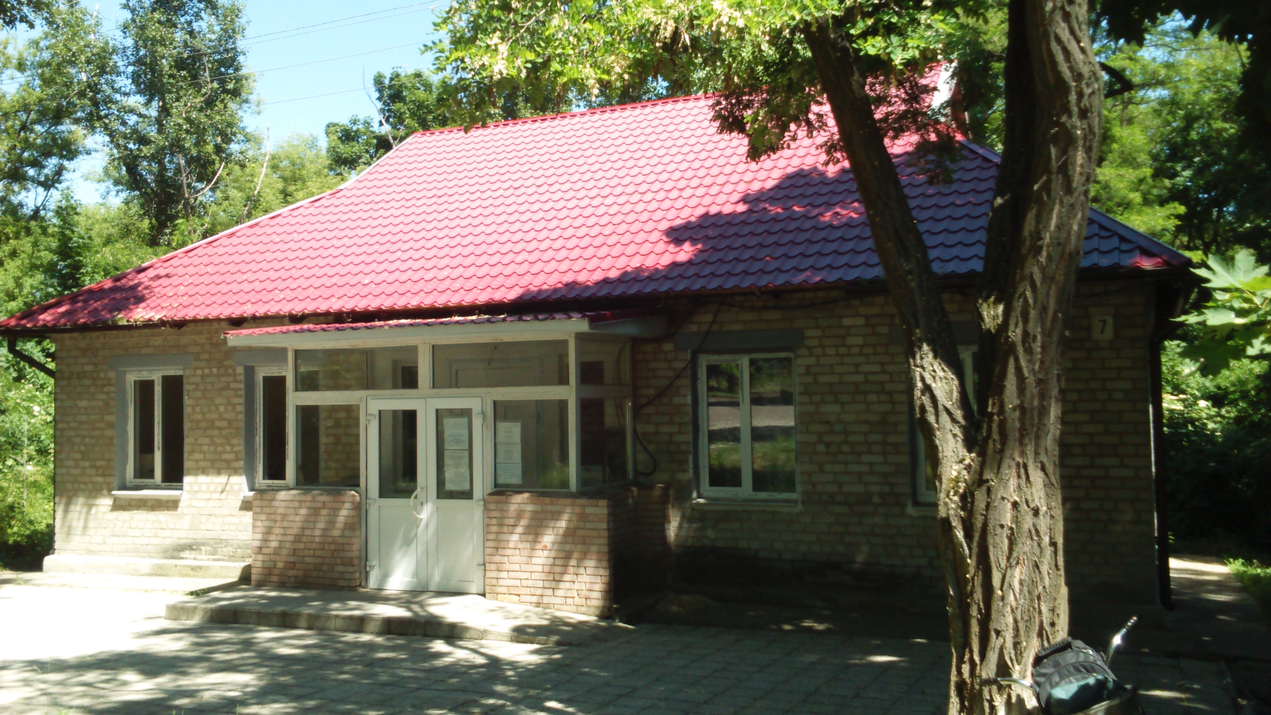 Ві́рівка — село в Україні, Добропільському районі Донецької області.